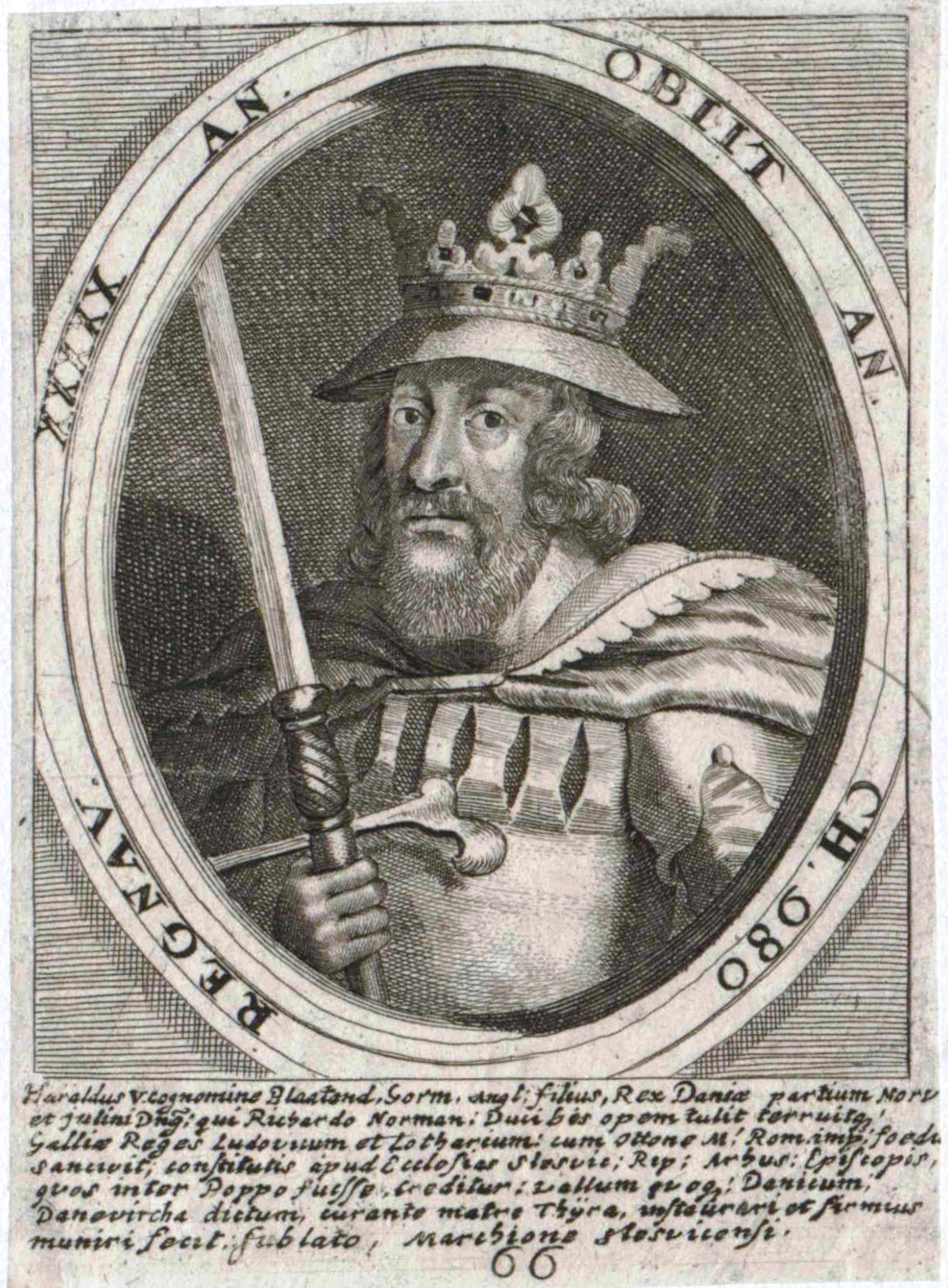 Harald Blauzahn († 987) in einer Darstellung aus dem 17. Jahrhundert